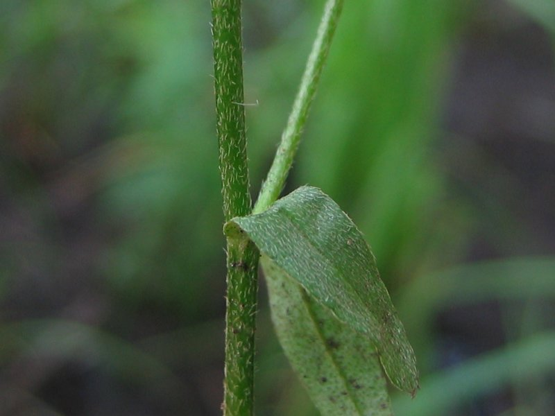 Sumpf-Vergissmeinnicht Myosotis scorpioides, Müritz-Gebiet